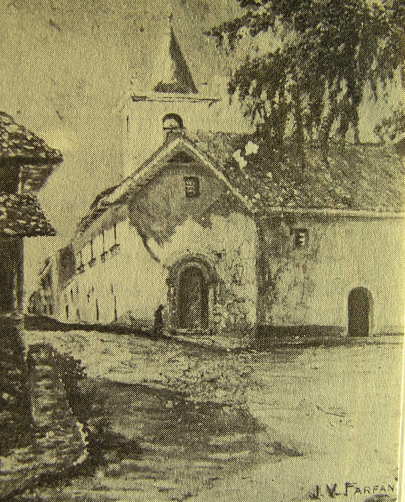 Ermita Vieja, pintura de Farfan, Cali Colombia